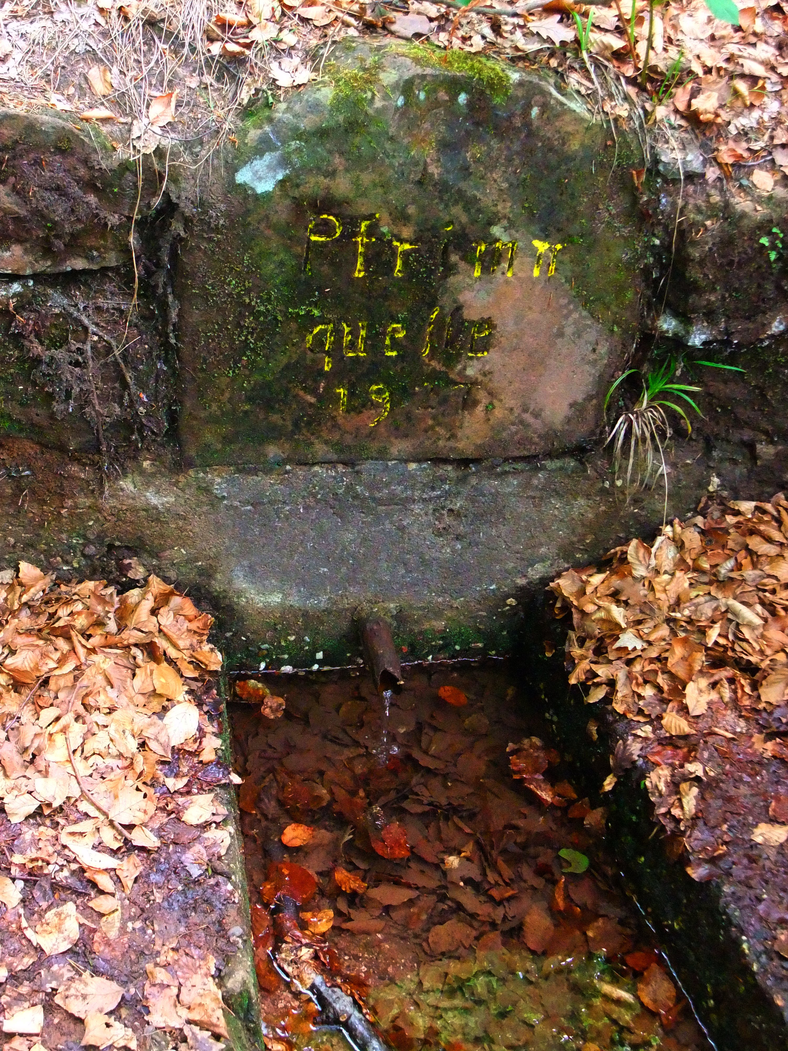 Pfrimm-Quelle südlich von Pfrimmerhof